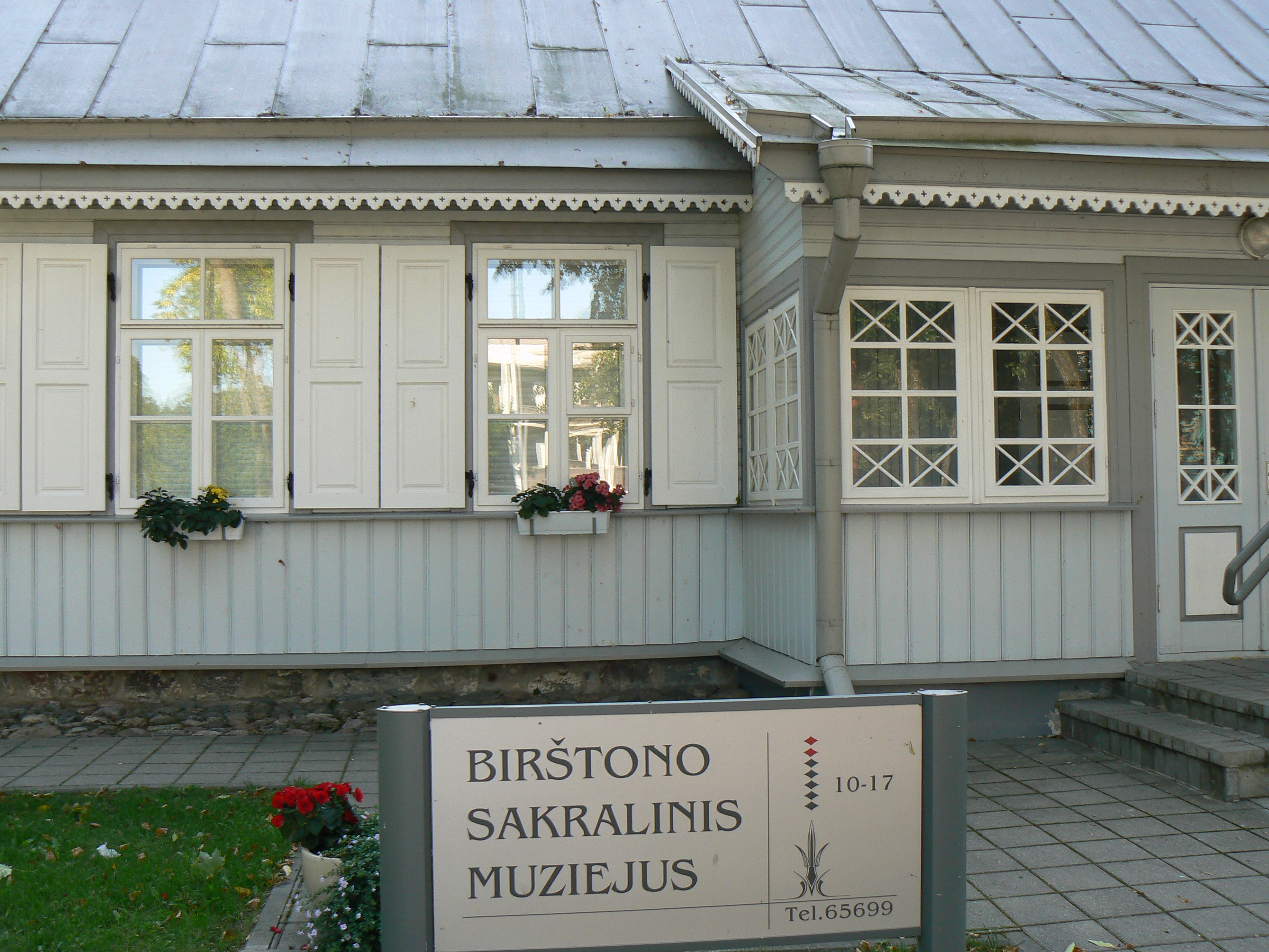 Sakrální muzeum ve městě Birštonas, Birutės g. 10Lietuvių: Birštono sakralinis muziejus